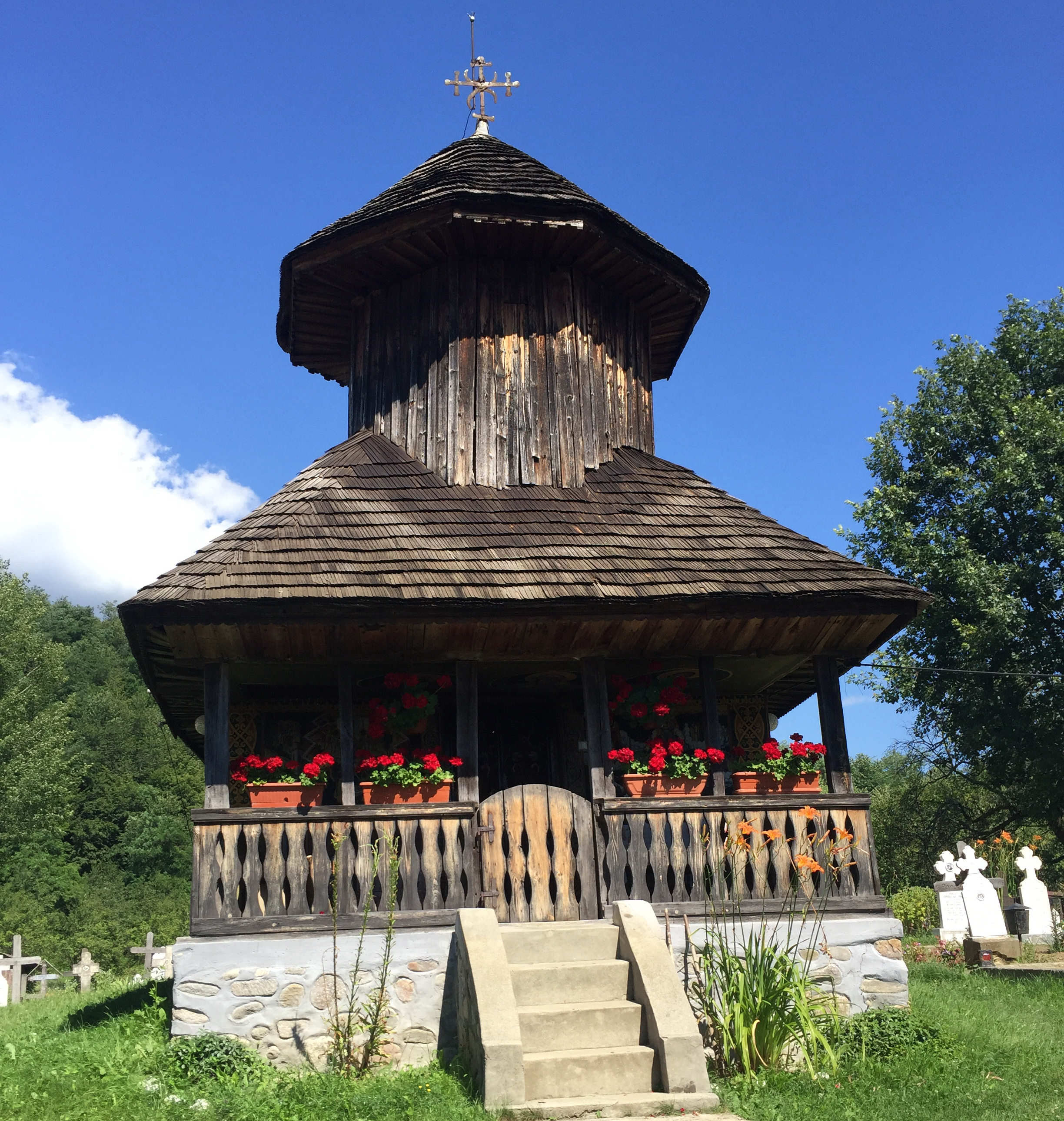 Biserica din Barbalatesti cu Hramul Nasterea Sf. Ioan Botezatorul monument istoric din anul 1802 - adaposteste racla cu parte din MOASTELE SFANTULUI IOAN BOTEZATORUL